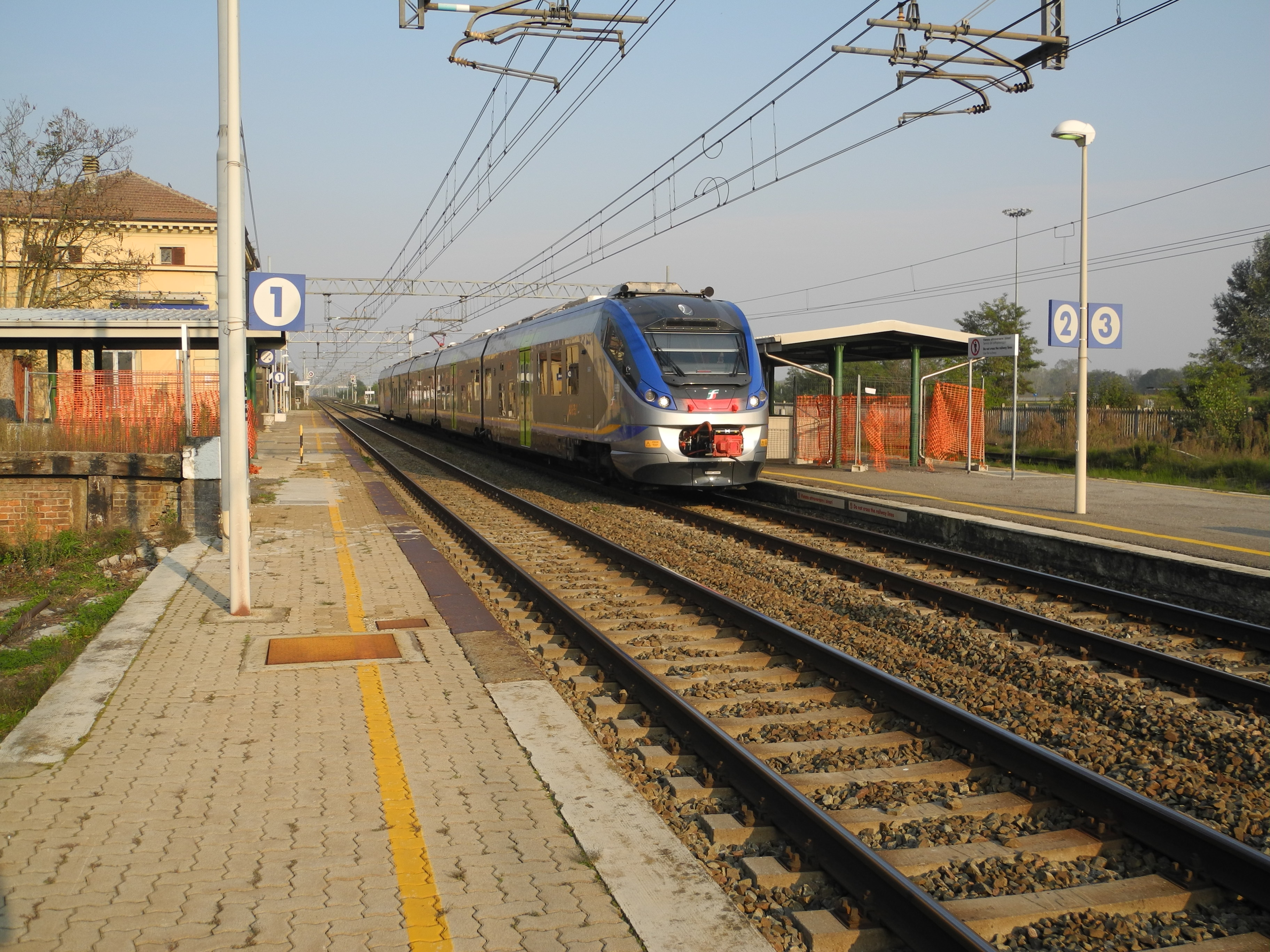 Treno Jazz (ETR.425) in sosta presso la stazione di Felizzano (AL), Italia.